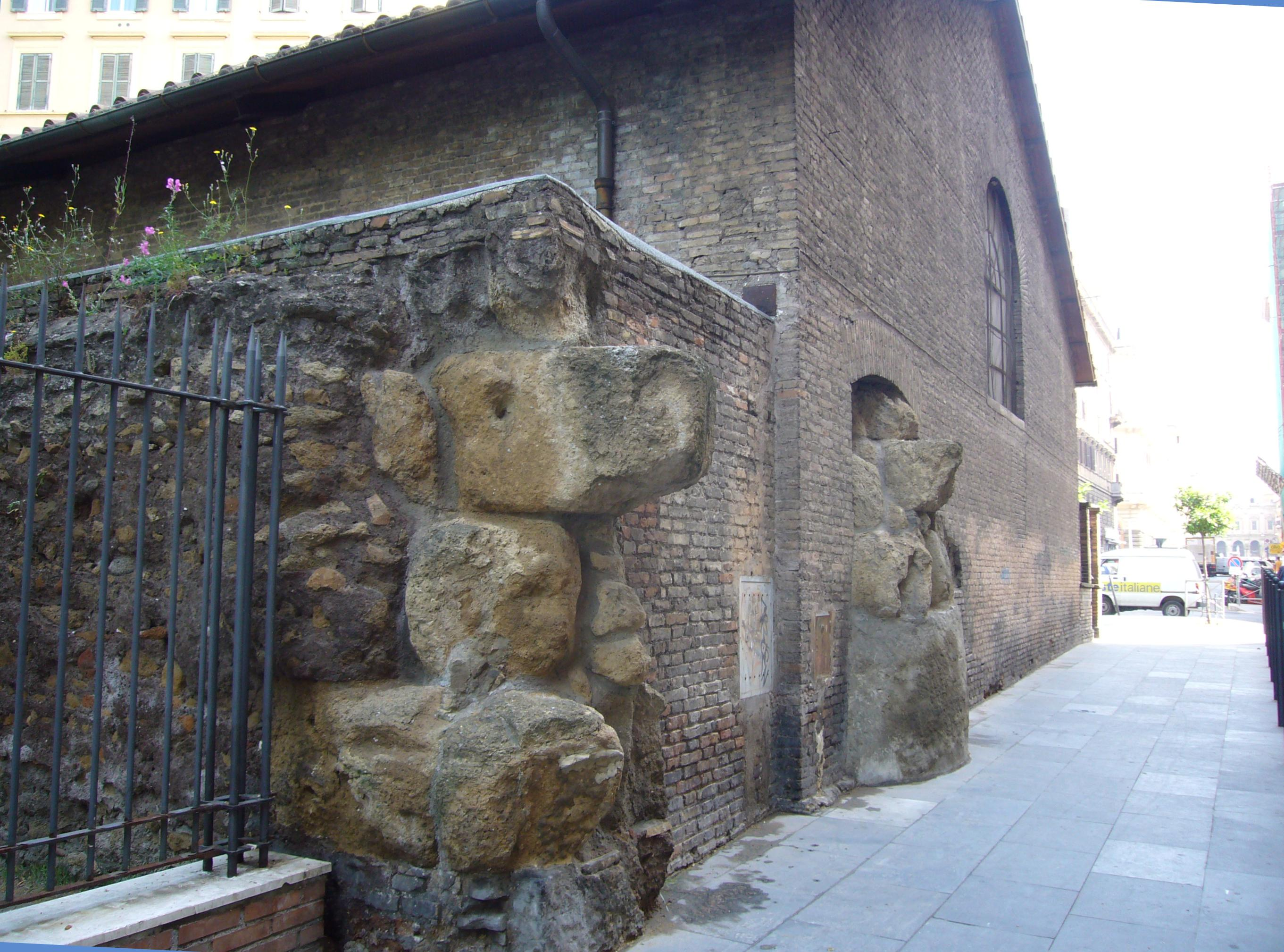 Roma, largo Leopardi: mura serviane incorporate nell'Auditorium di Mecenate